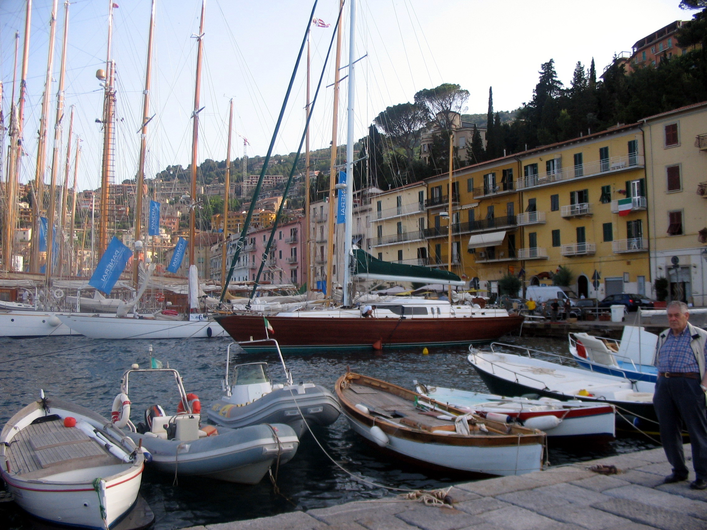 Porto Santo Stefano, Toscana, Italia